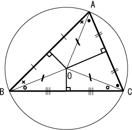 三邊中垂線交點為外心